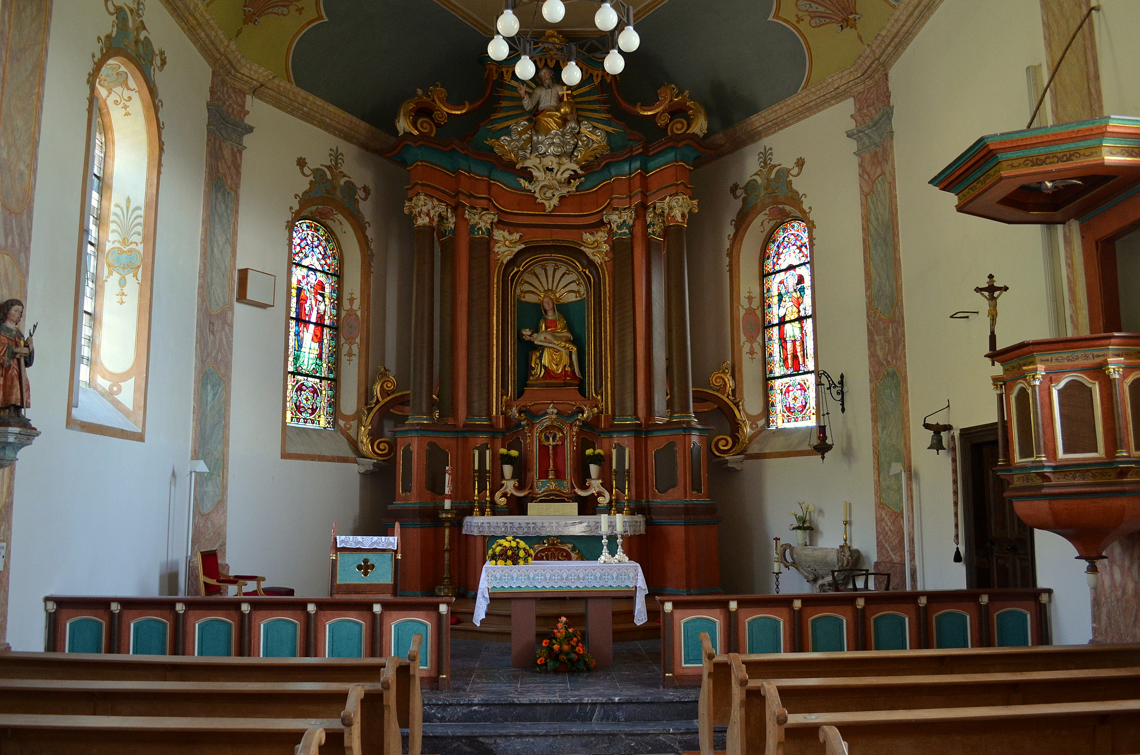 Altaarruimte met in het altaar een piëta uit 1275.